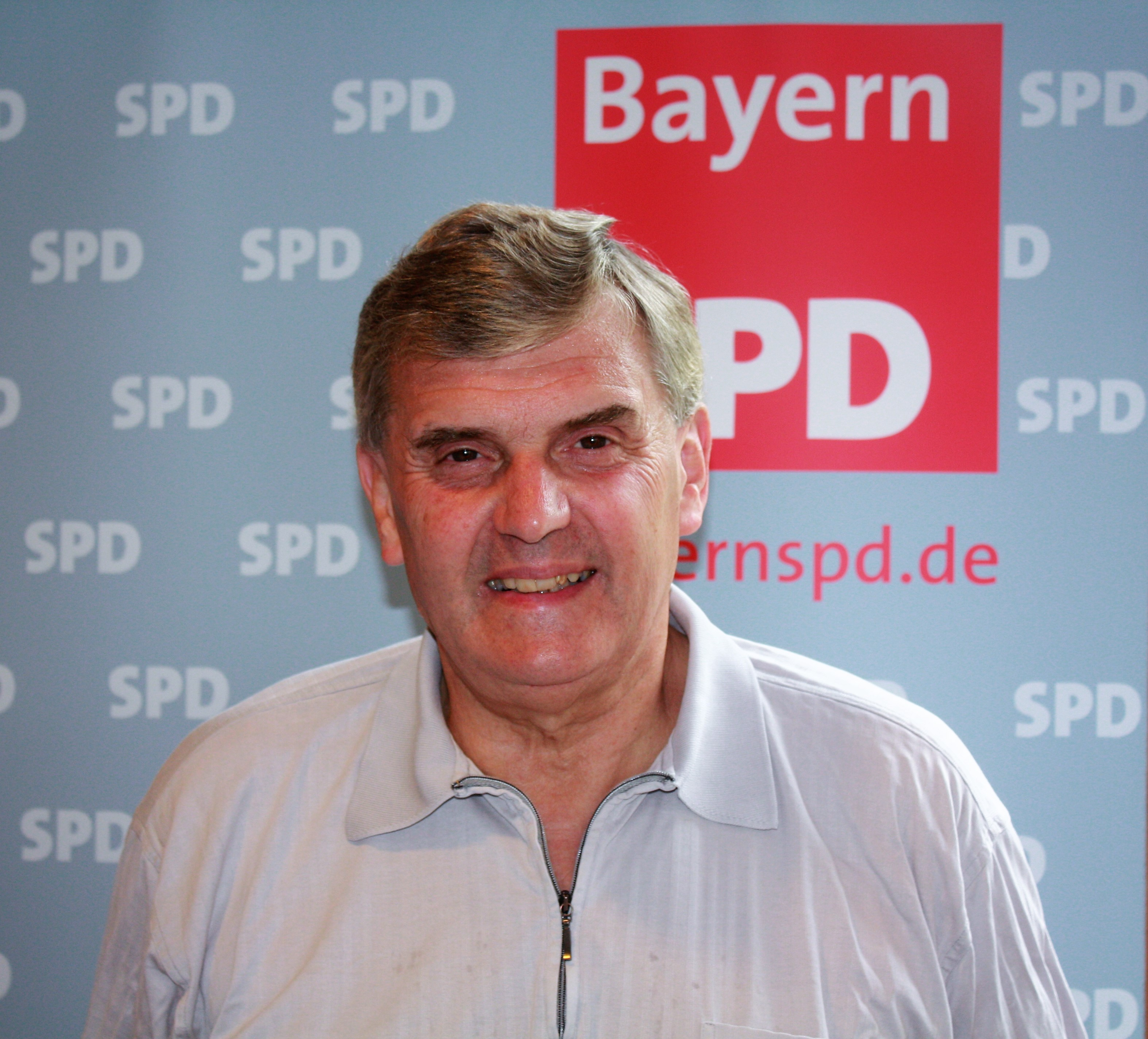 Ewald Schurer bei einer Wahlkampfveranstaltung in Markt Schwaben.